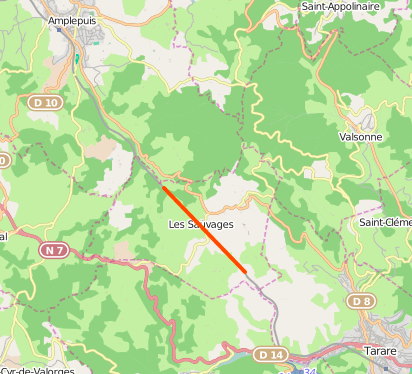 Carte openstreetmap du tracé du tunnel.